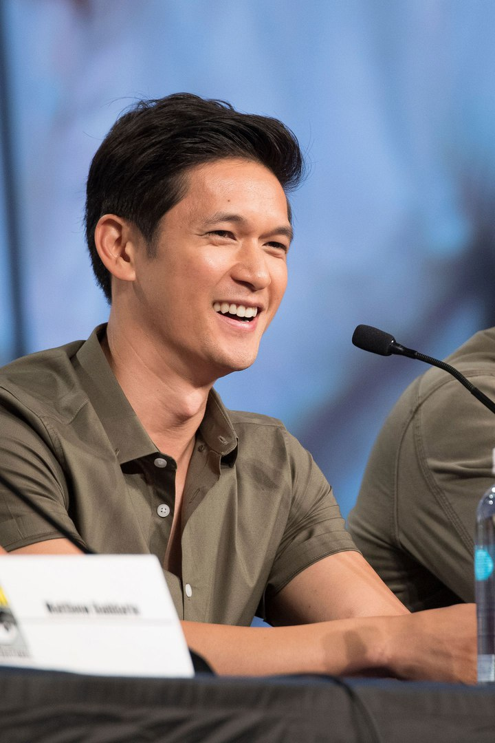 Harry Shum Jr. podczas San Diego ComicCon 2017